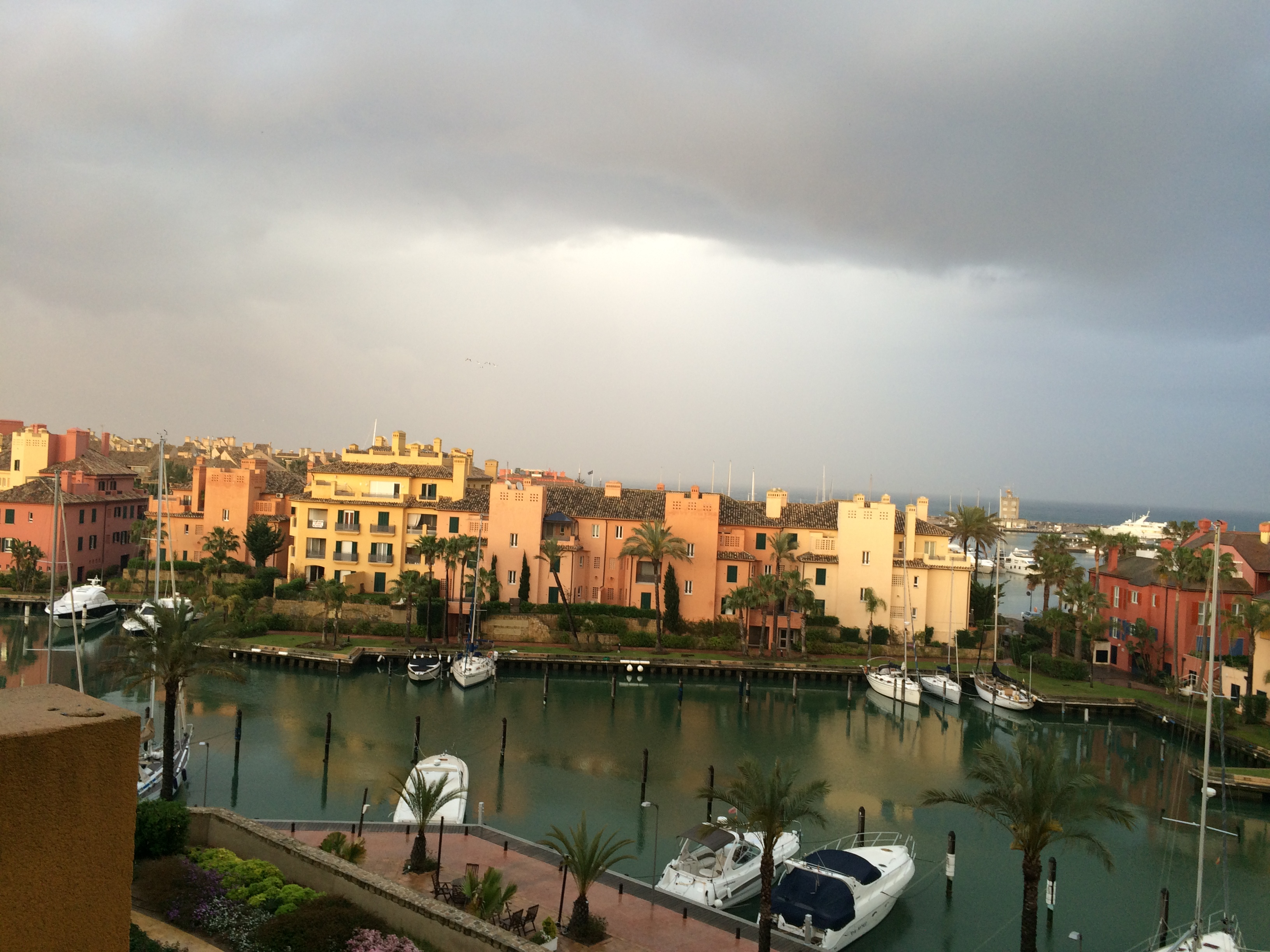 rivera del marlin